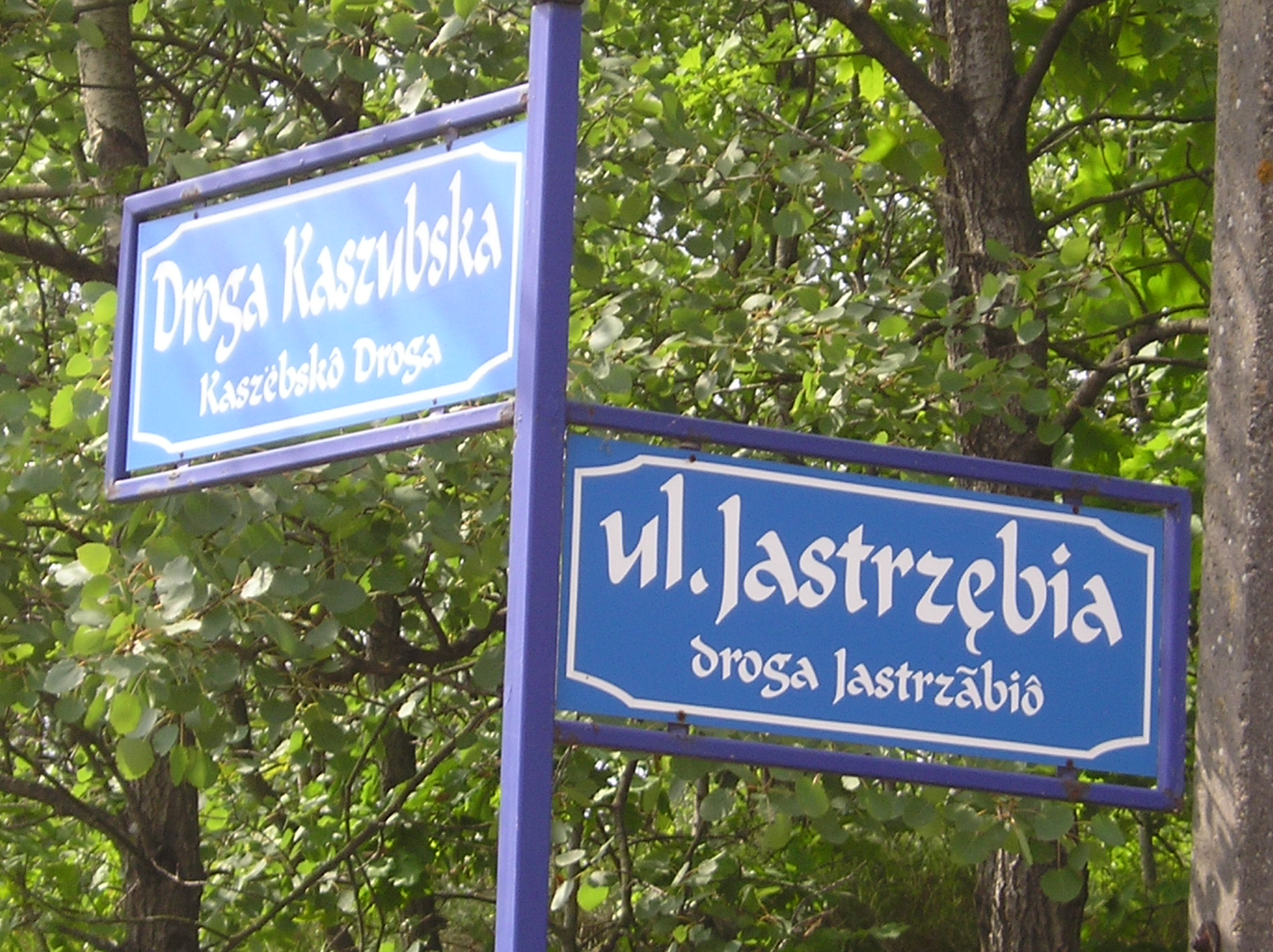 Dwujęzyczna tablica z nazwą ulicy po polsku i kaszubsku w miejscowości Ostrzyce